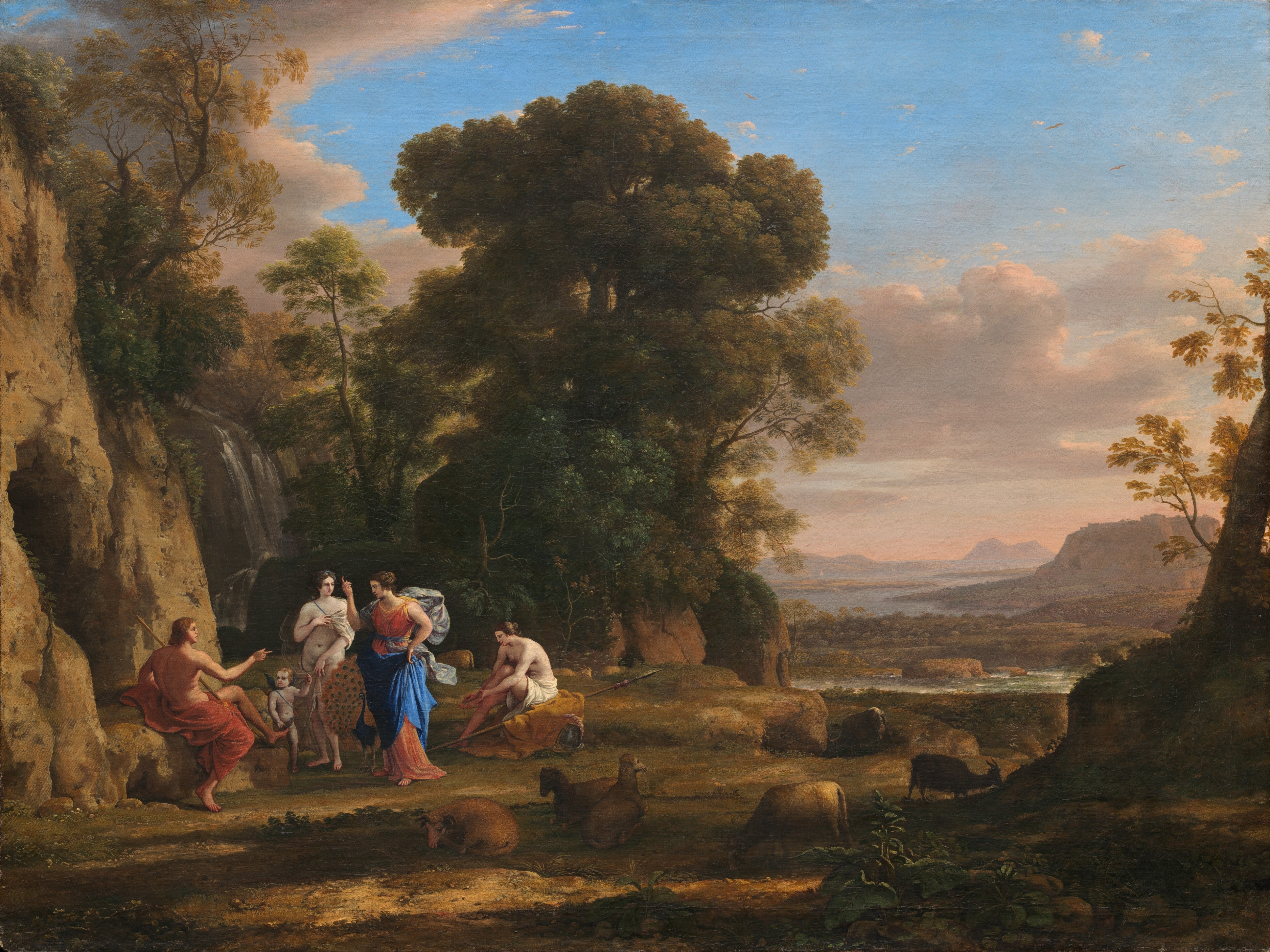 Der Maler wählt hier eine Landschaft der römischen Campagna als Schauplatz. Neben Paris, der hier unerkannt seit seiner Geburt als Knabe lebte, finden sich die drei Göttinnen Hera (Macht), Athene (Weisheit) und Aphrodite (Liebe) vor ihm ein, die alle für sich beanspruchen, die Schönste zu sein. Die eitle Frage hatte sich die Göttin Eris aus Rache ausgedacht, um Zwietracht zwischen ihnen zu säen, da sie nicht zur Hochzeit von Peleus und Thetis eingeladen worden war. Sie musste nun vom Göttersohn beantworten werden. Paris wählte die Aphrodite, die Liebe. Damit stand einer Aufnahme in das trojanische Königshaus nichts mehr im Wege.